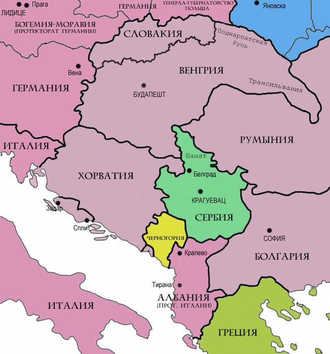 Карта Балканского полуострова (1942 год)